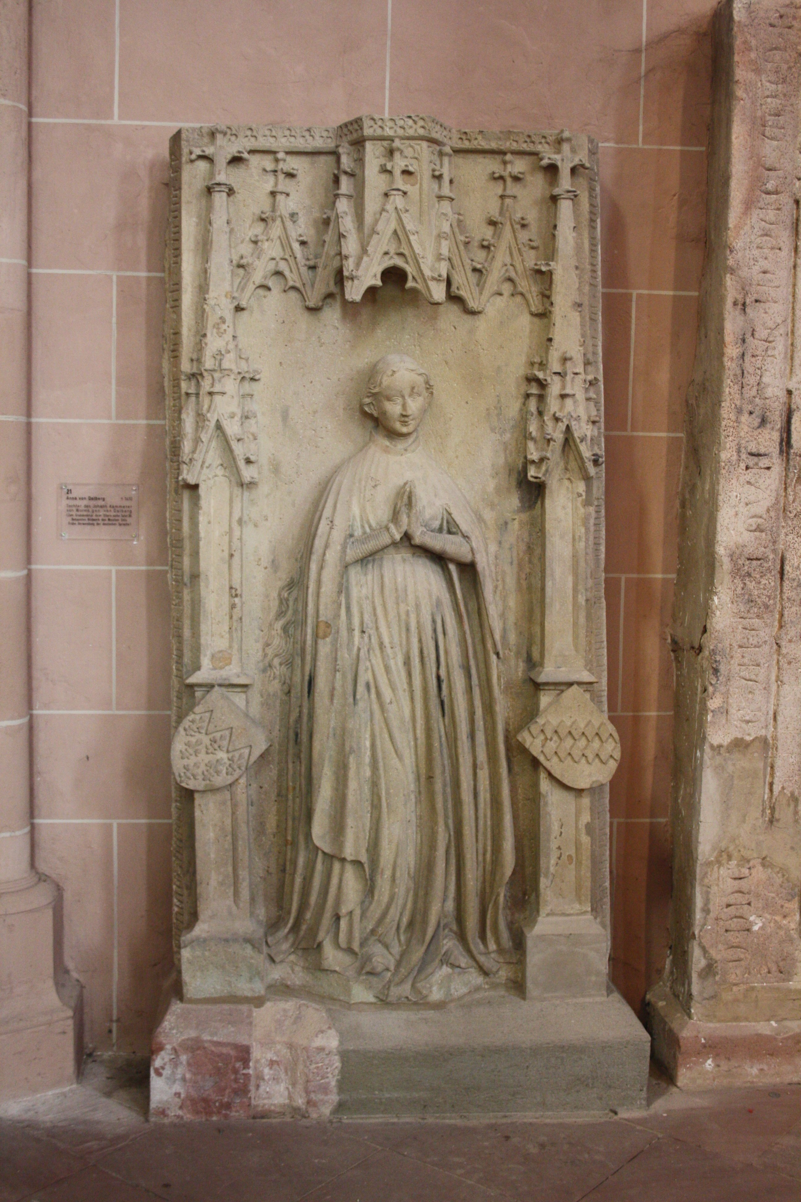 Katharinenkirche Oppenheim Anna von Bickenbach, verheiratete von Kämmerer von Worms, genannt von Hohenstein, auch: von Dalberg, † 1415